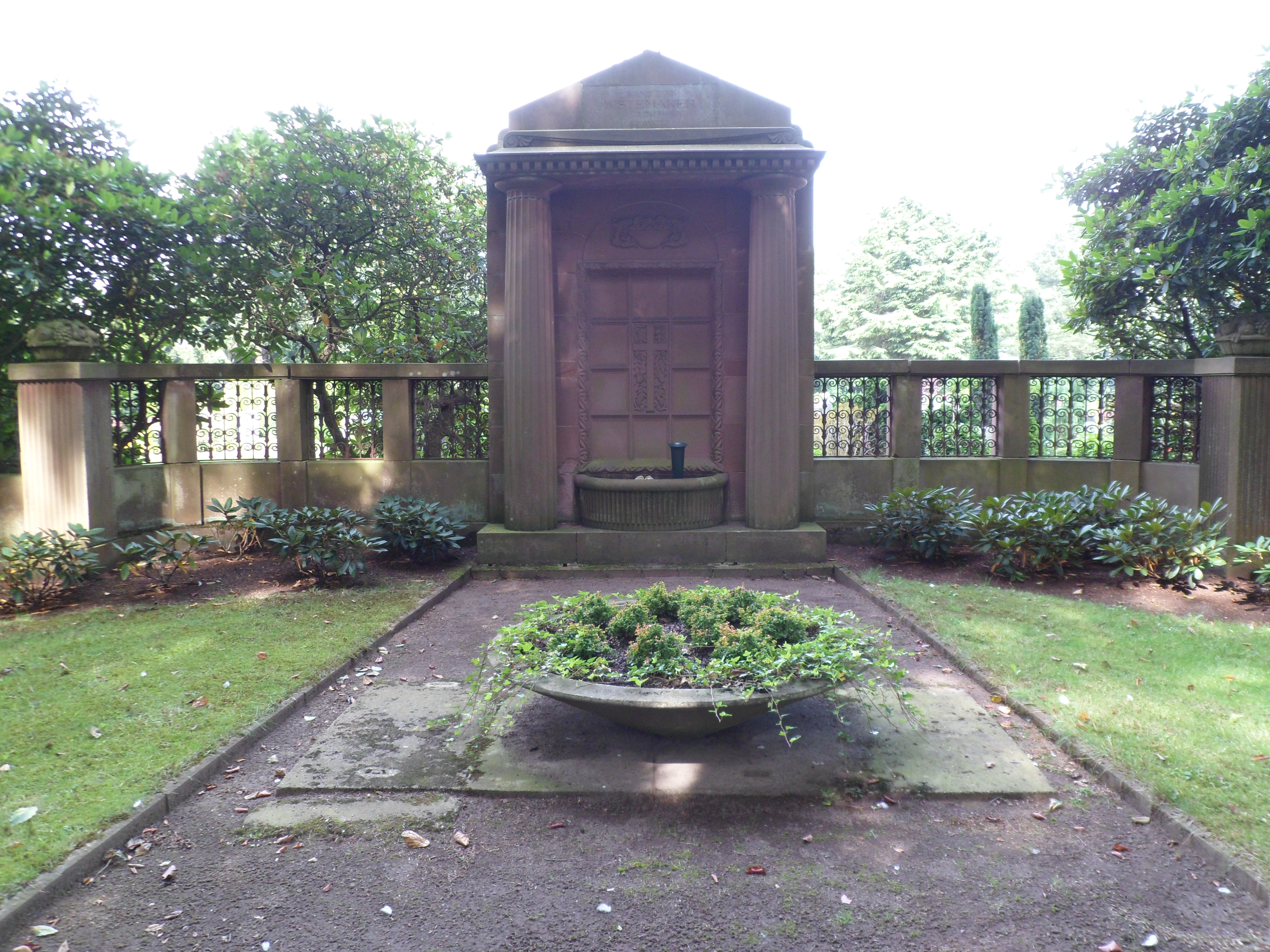 Nordfriedhof Nordhorn, Grabstätte Familien Kistemaker und Rawe